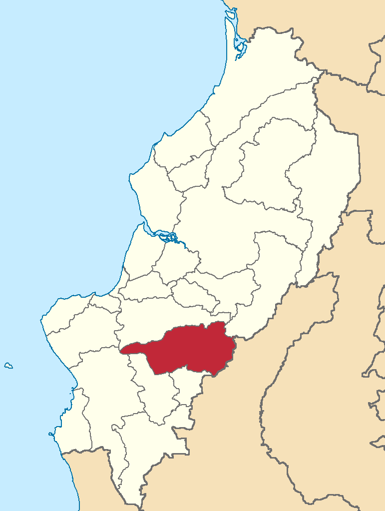 Mapa localizador del cantón en Manabí, Ecuador